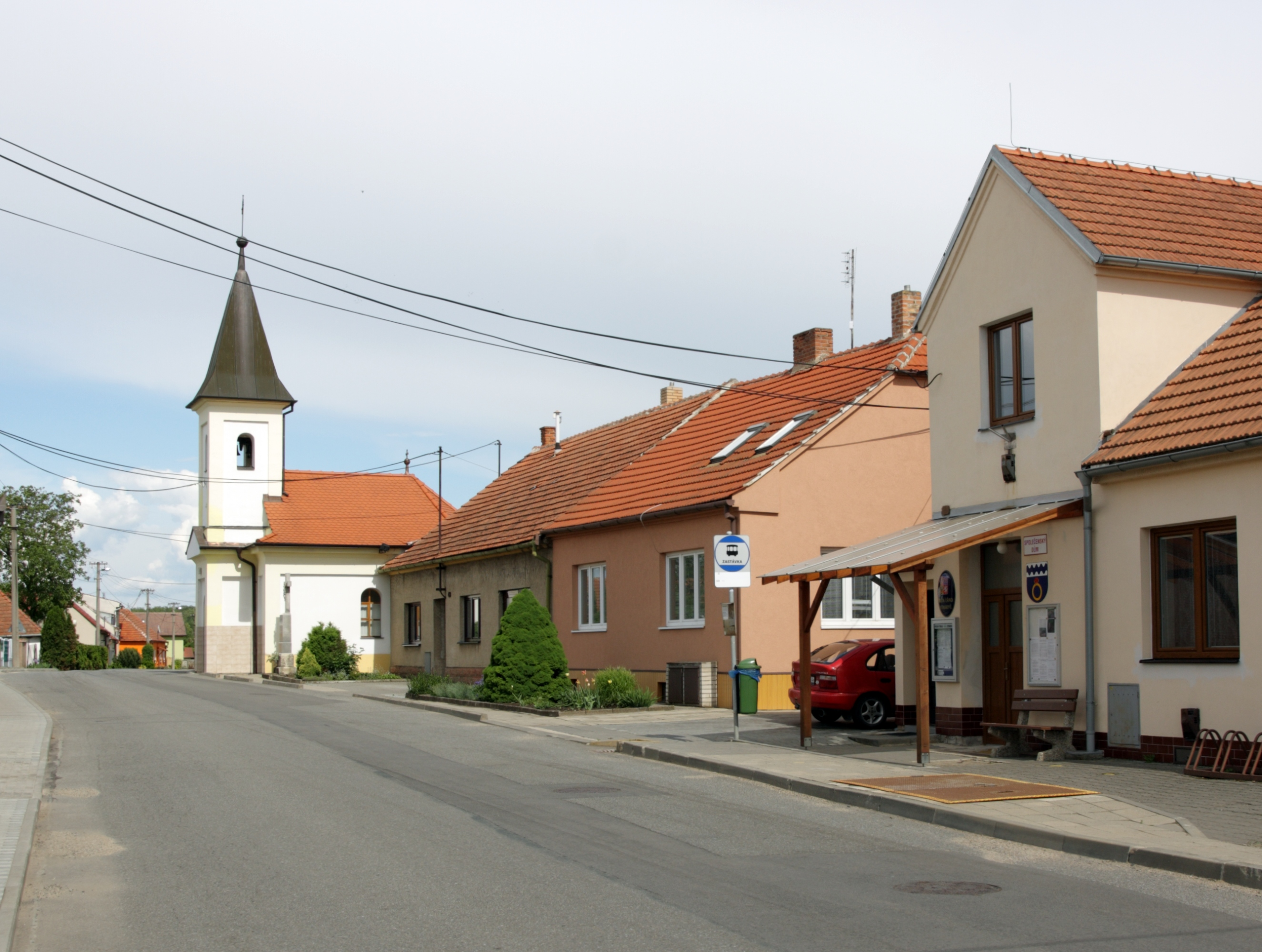 Otmarov - střed obce.